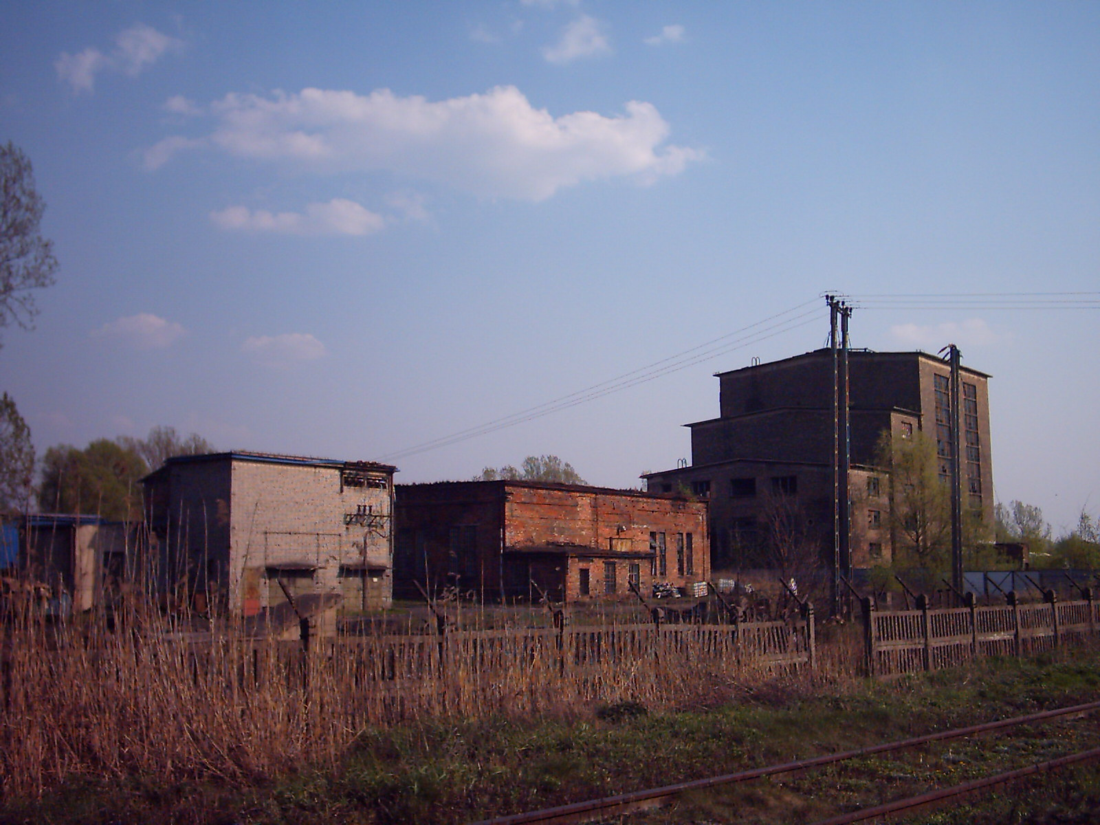 Gryfskand Hajnówka